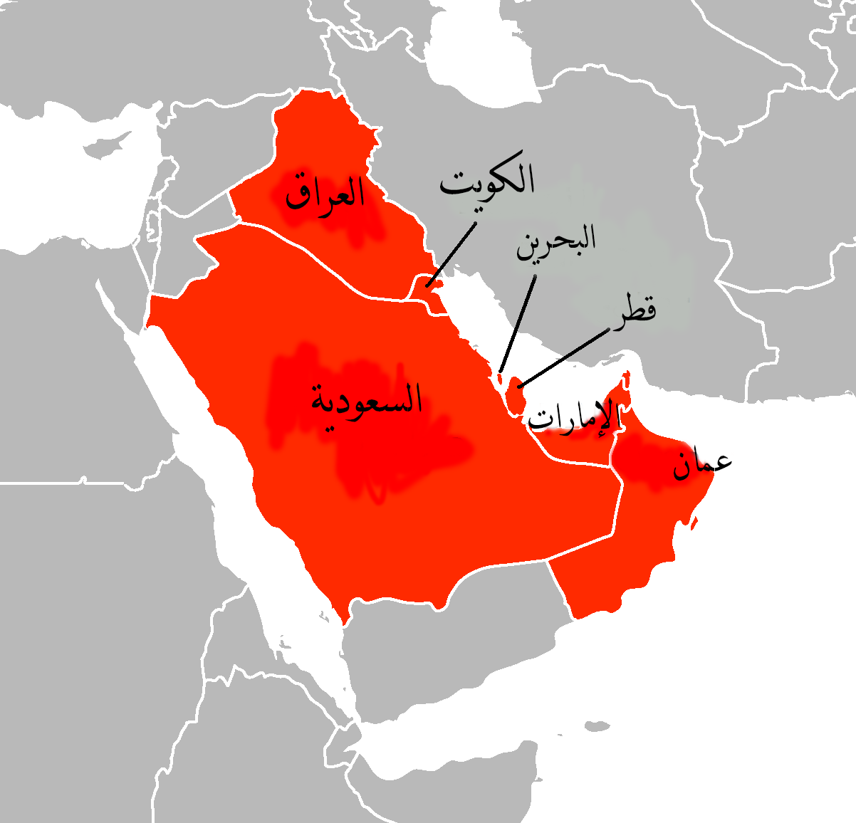 صورة للدول العربية المُطلة على الخليج العربي